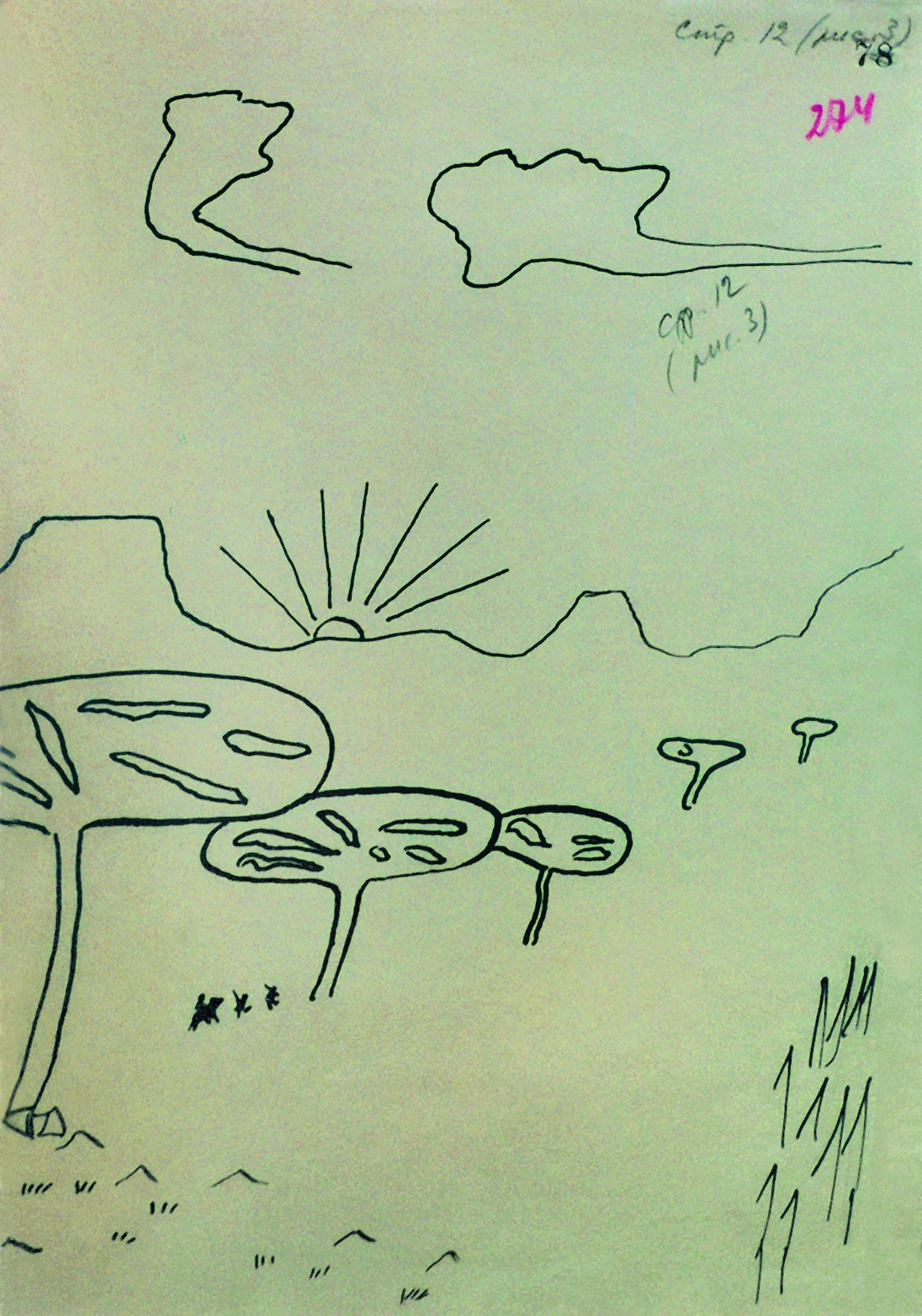 Gumilev. African pattern